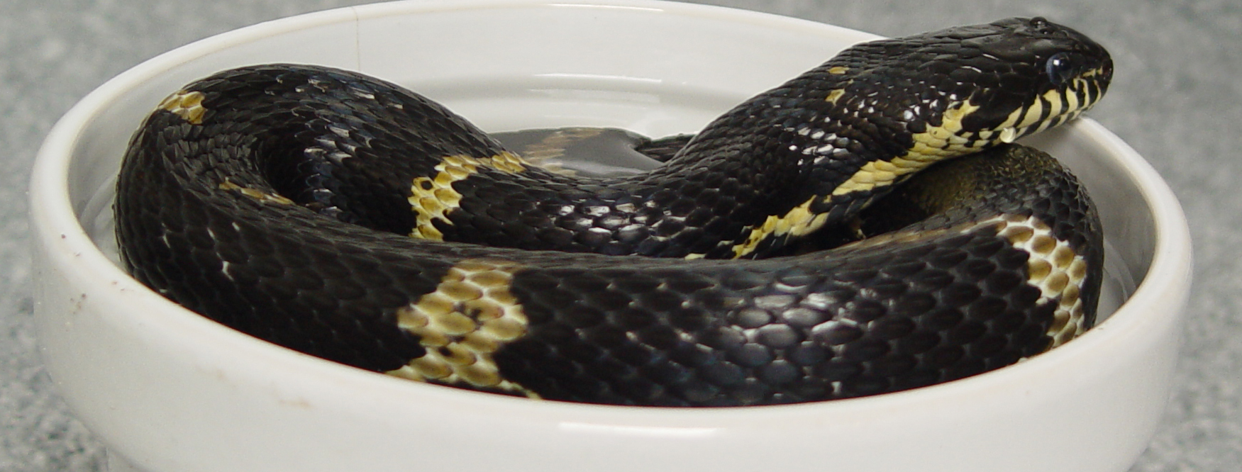 Picture of Elaphe Schrenki Schrenki